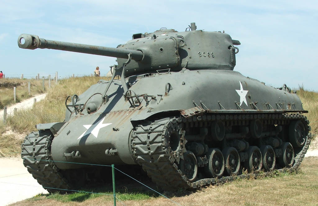 Utah Beach - D-day - Sherman tank